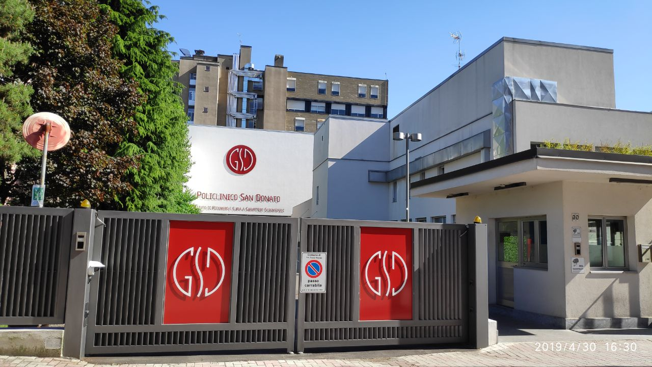 Ospedale GSD di San Donato Milanese - Ingresso via Maritano (2019)